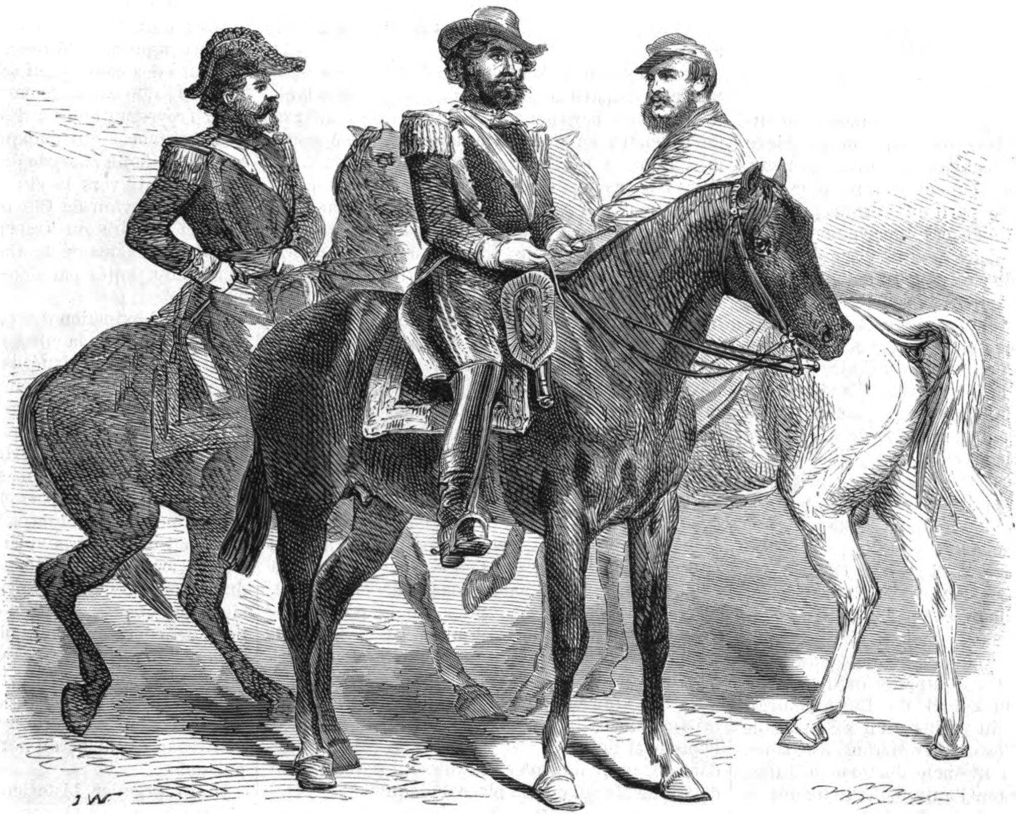 Recontre des généraux Florès, Mitre et du maréchal Lopez. - D'aprés un dessin de M. Meyer